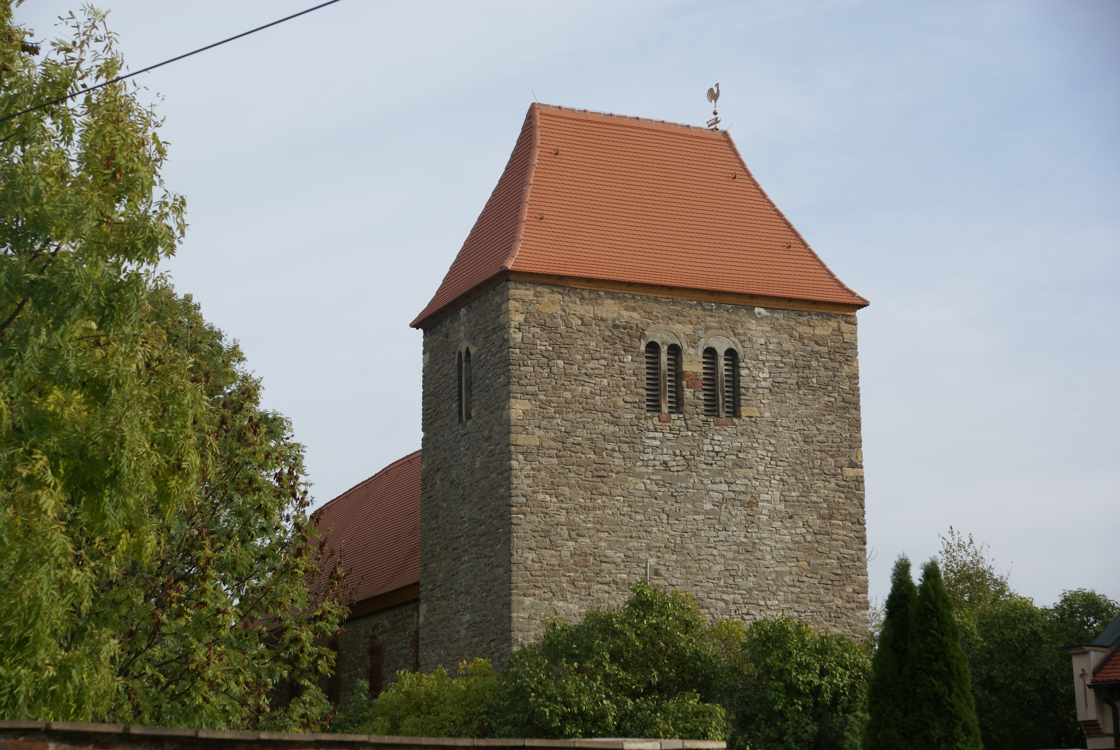 Die Kirche St. Bartholomäus in Erdeborn, Landkreis Mansfeld-Südharz This is a photograph of an architectural monument. 08176